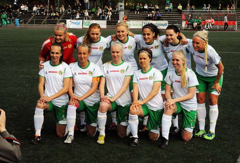 a_10_1279